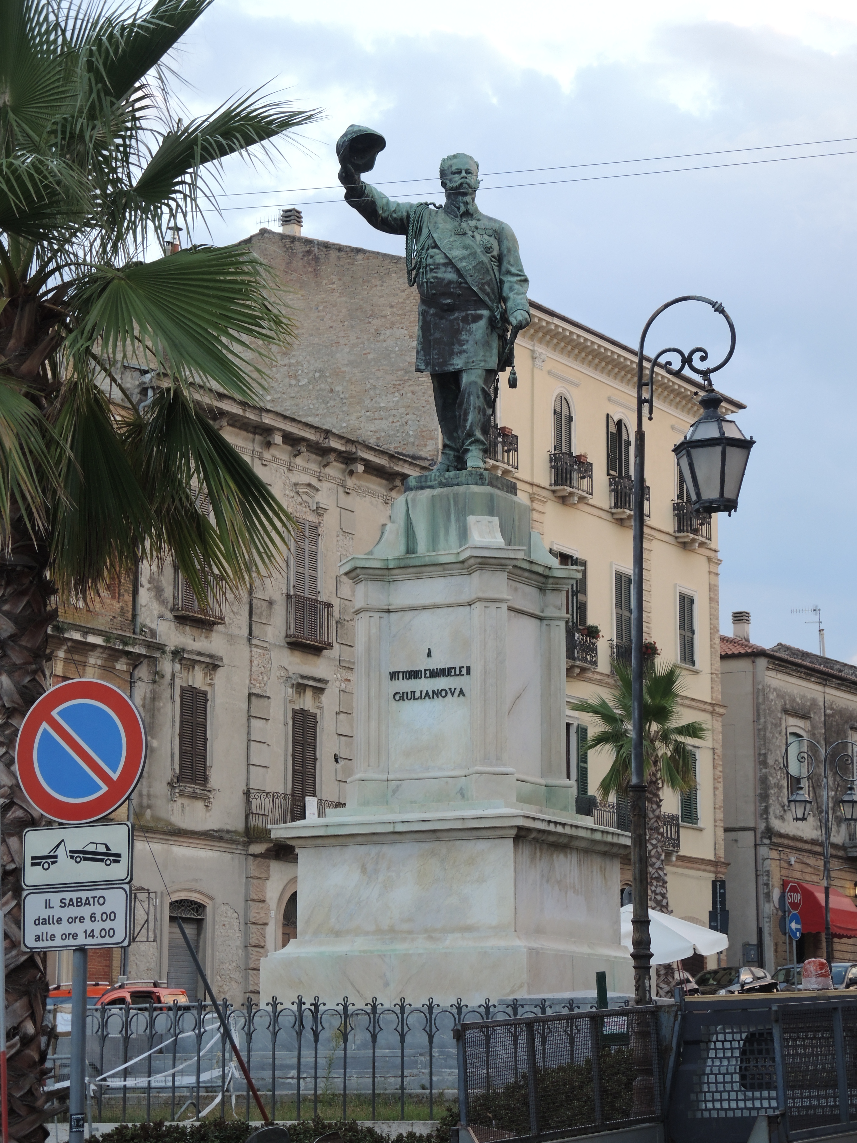 Monumento a Vittorio Emanuele II, opera di Raffaello Pagliaccetti (1839-1900) This is a photo of a monument which is part of cultural heritage of Italy.